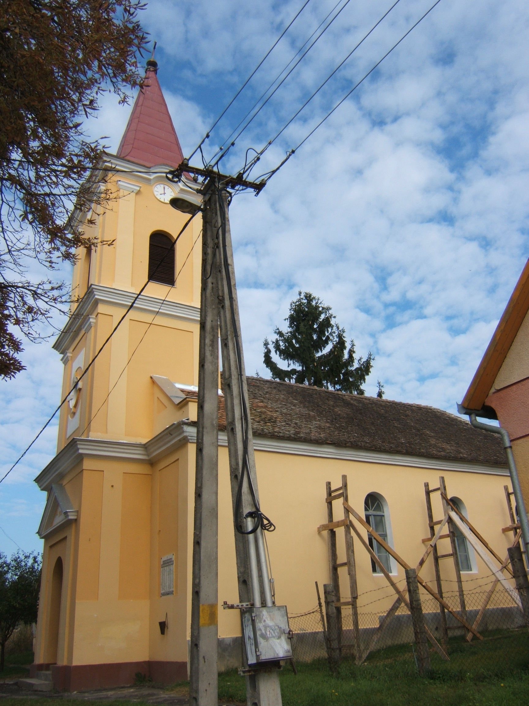 Gadács, evangélikus templom